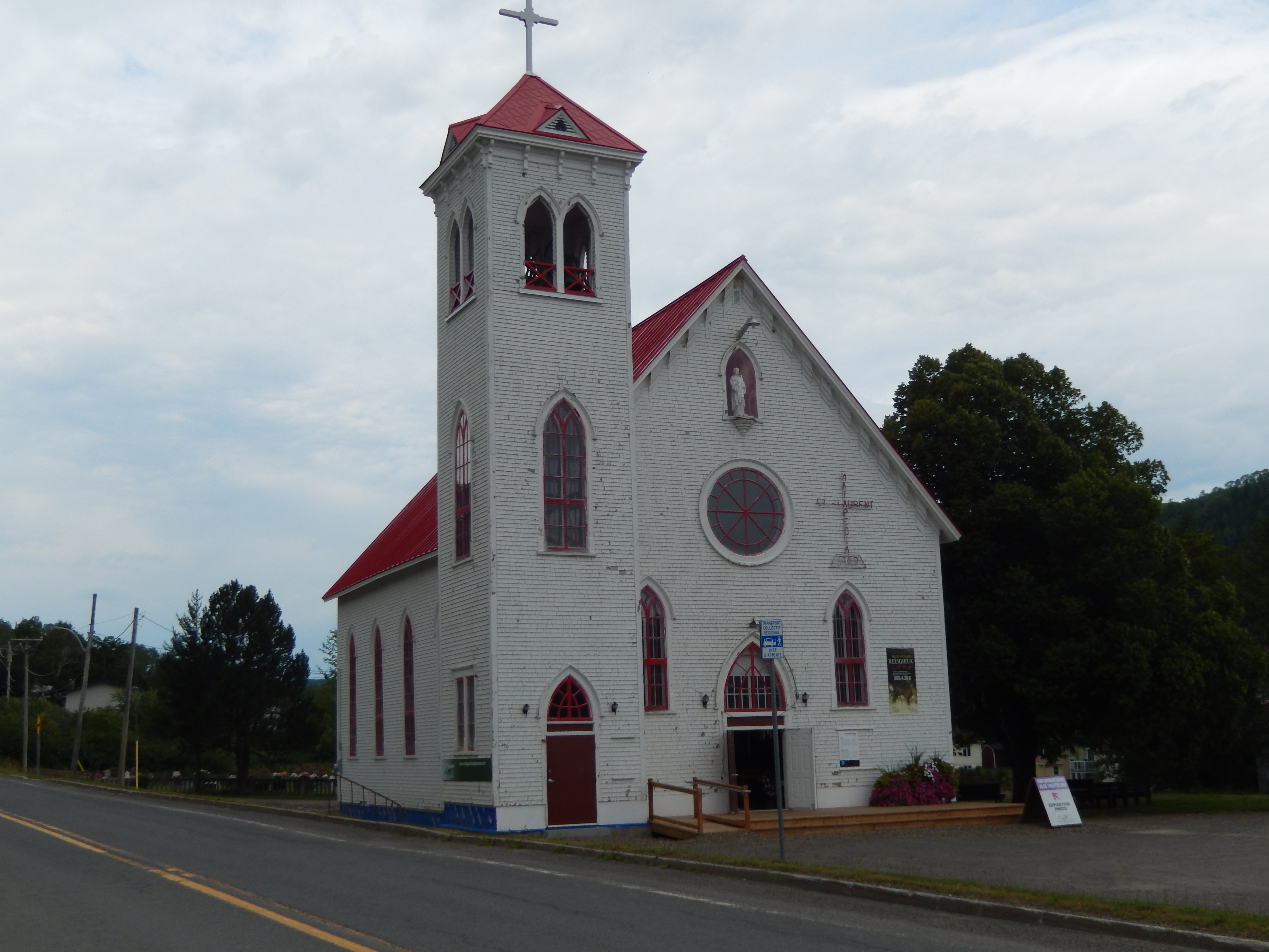 Église Saint-Laurent de Matapédia